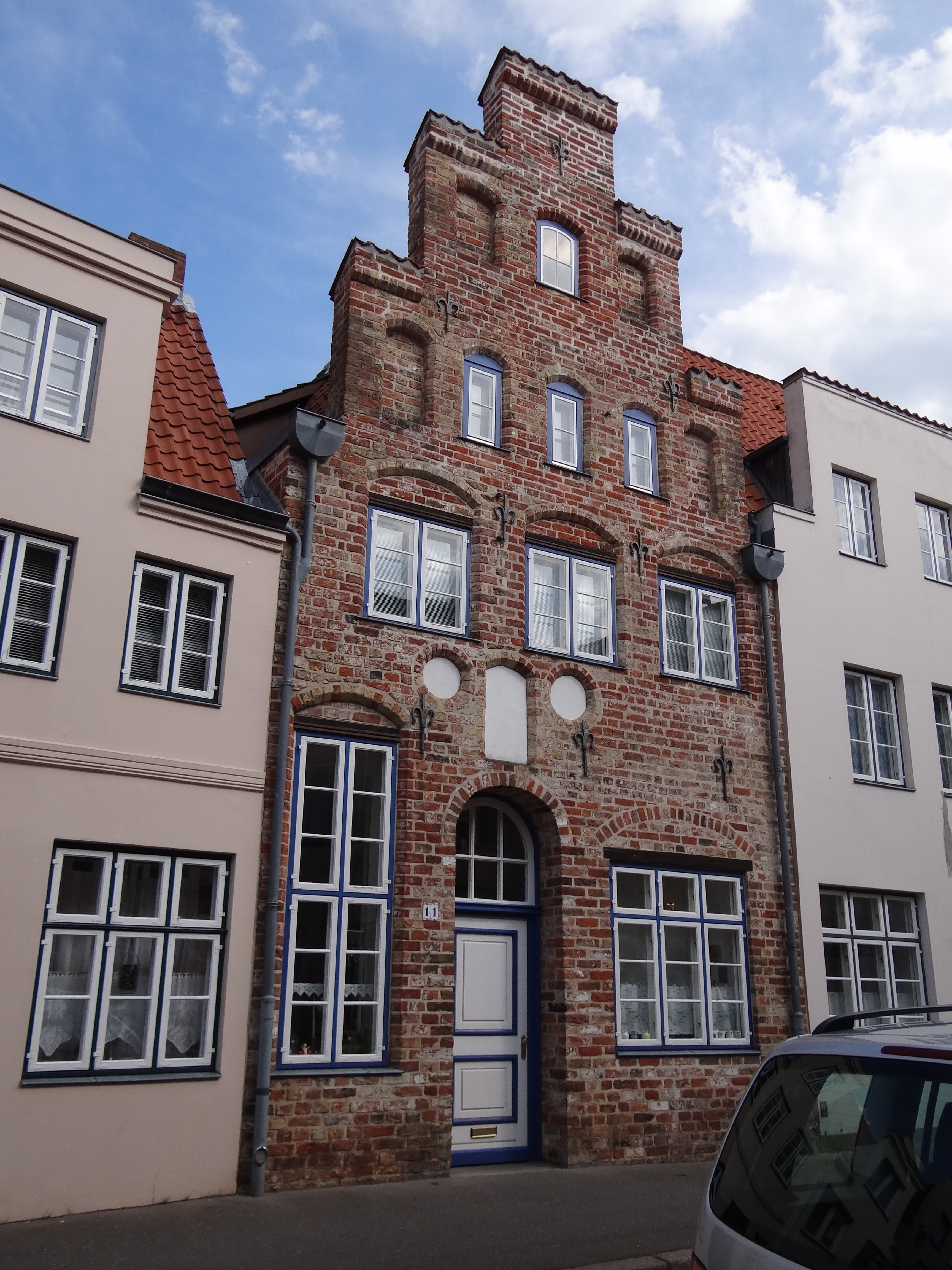 Tünkenhagen - Lübeck {juli 2013}